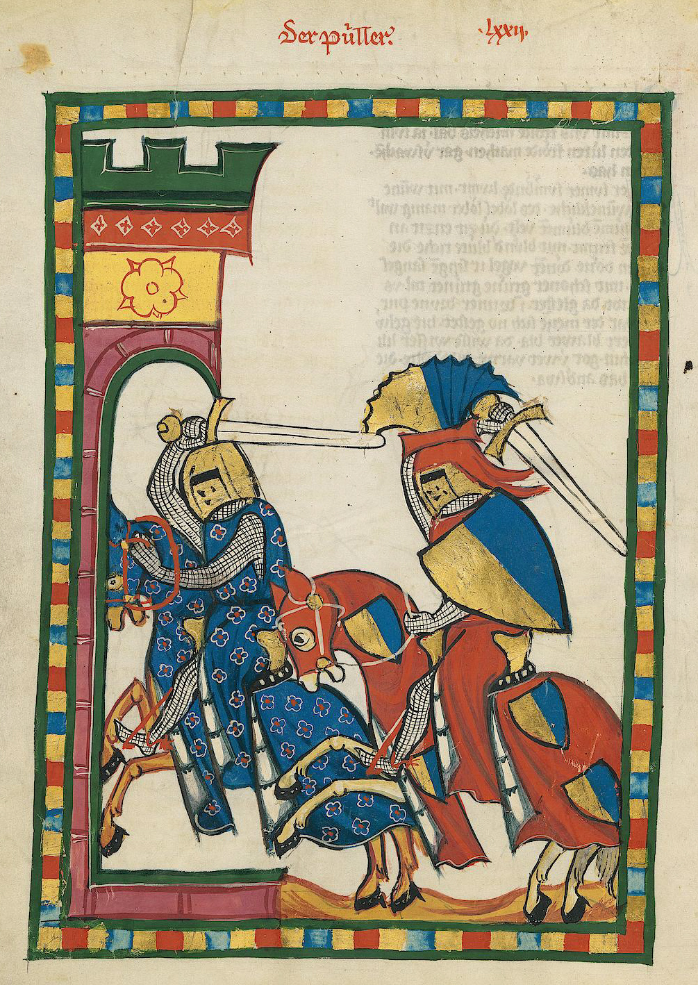 Codex Manesse, UB Heidelberg, Cod. Pal. germ. 848, fol. 253v: Der Püller